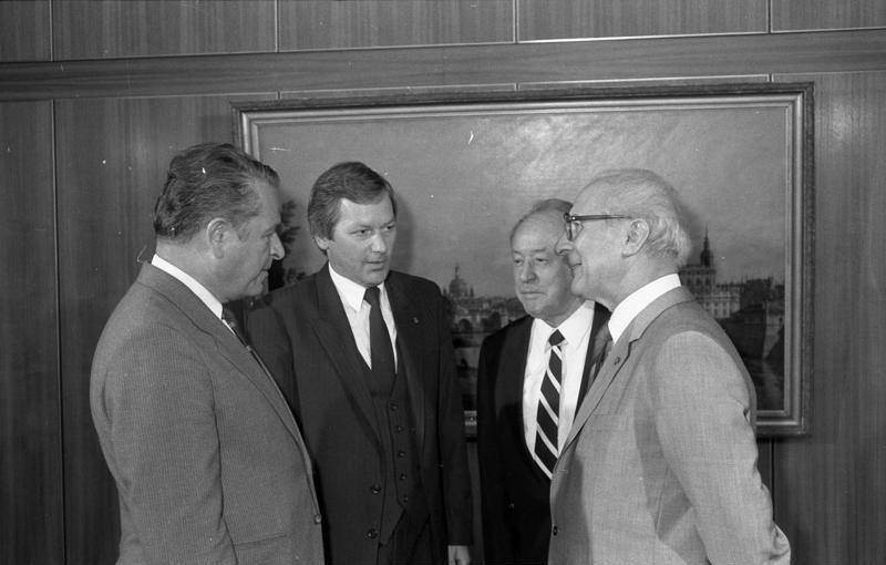 Berlin, Erich Honecker empfängt Waffengeneral Kiszczak ADN-ZB/Zimmermann 29.6.88 Berlin: Gespräch im ZK Der Generalsekretär des ZK der SED und Vorsitzende des Staatsrates der DDR, Erich Honecker, empfing das Mitglied des Politbüros des ZK der PVAP, den Minister des Innern der VR Polen, Waffengeneral Czeslaw Kiszczak (l.), zu einem freundschaftlichen Gespräch. Daran nahm das Mitglied des Politbüros des ZK der SED Armeegeneral Erich Mielke (2.v.r.) , Minister für Staatssicherheit, teil. Abgebildete Personen: Mielke, Erich: Minister für Staatssicherheit, Armeegeneral, Politbüro des Zentralkomitees (ZK) der SED, DDR (GND 118977490) Honecker, Erich: Staatsratsvorsitzender, Generalsekretär des ZK der SED, DDR (GND 118553399)